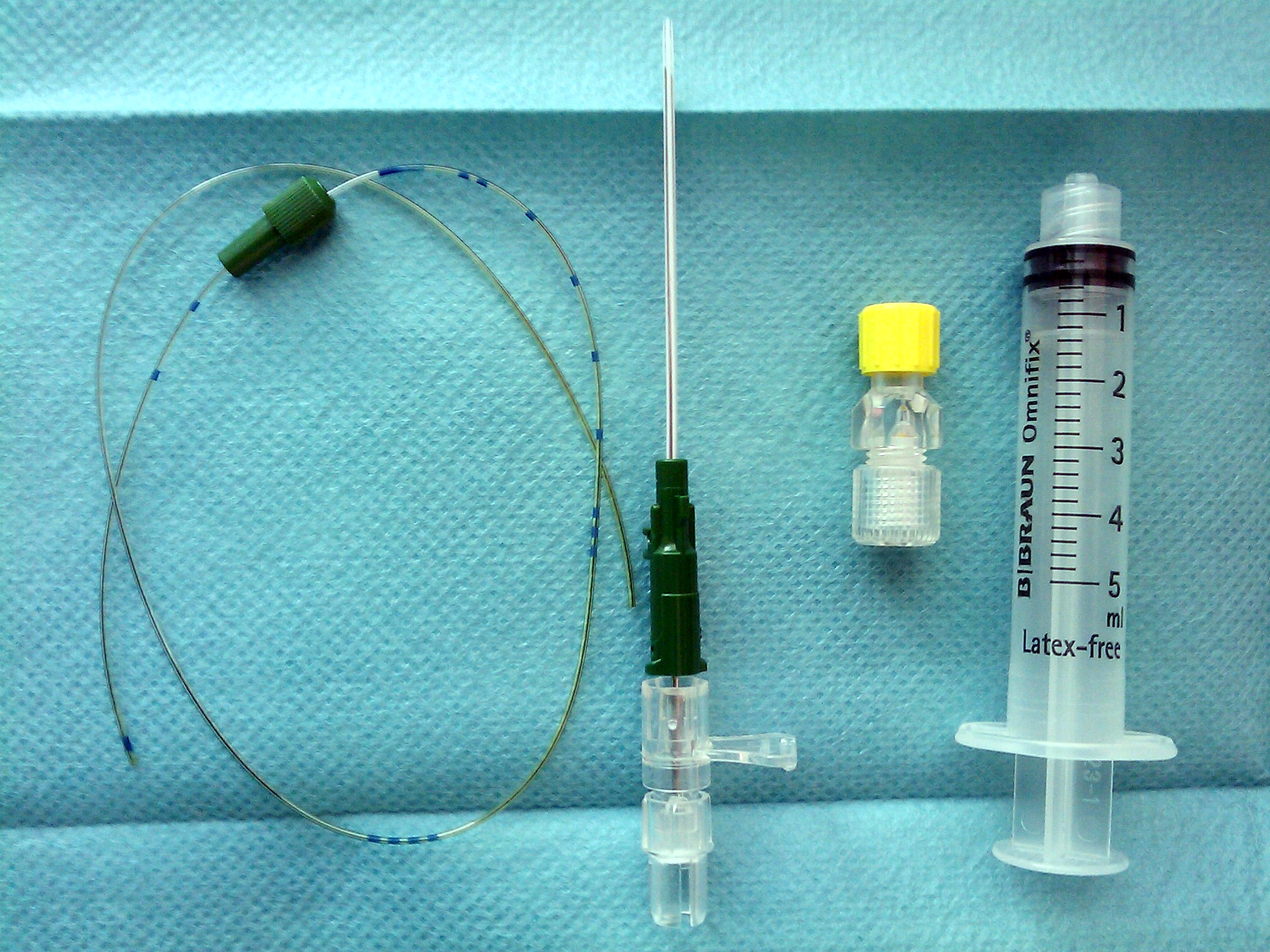 Regional anesteziya; sinir kələflərinin blokadası üçün kateter